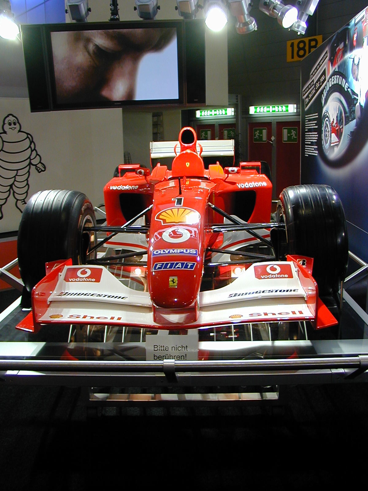 Salon de Genève 2004 SAG2004 193 Ferrari F1 de Schumacher - F2003-GA